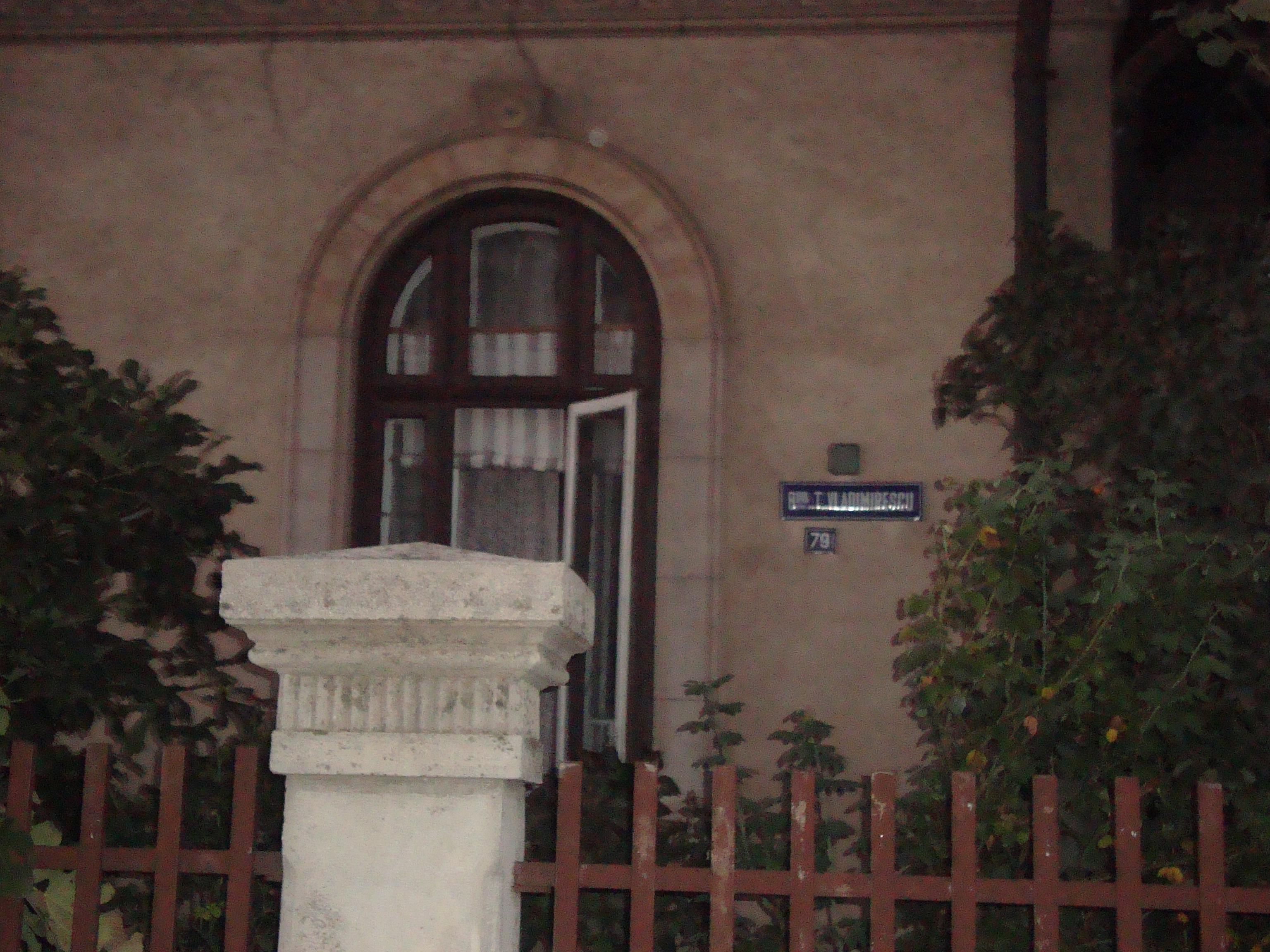 Casa Ghiculescu Nicoletti (pe strada Orly colt cu Bd. Vladimirescu Tudor)